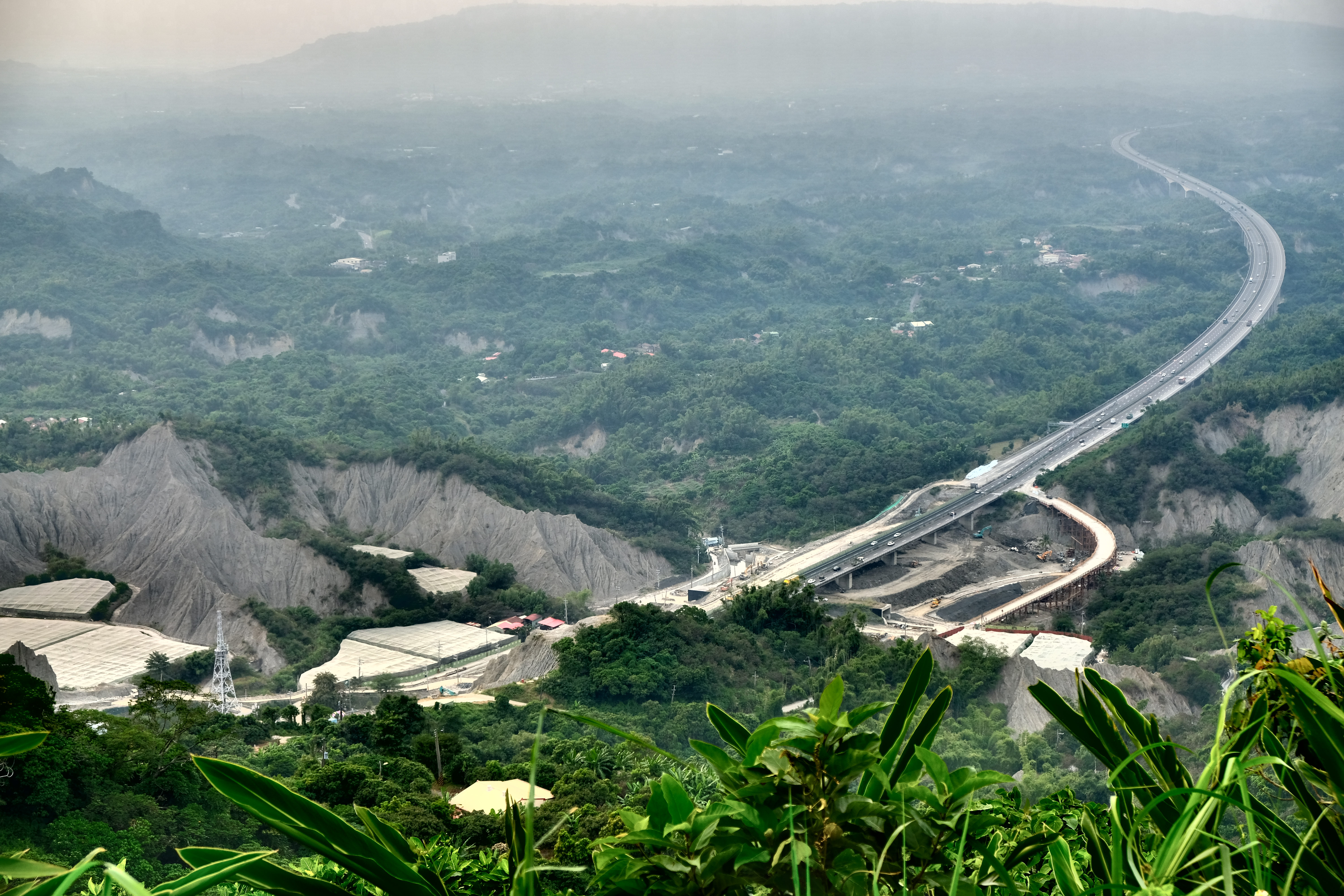 2018Freeway 3 (Taiwan)高雄田寮三號高架橋填為路堤工程